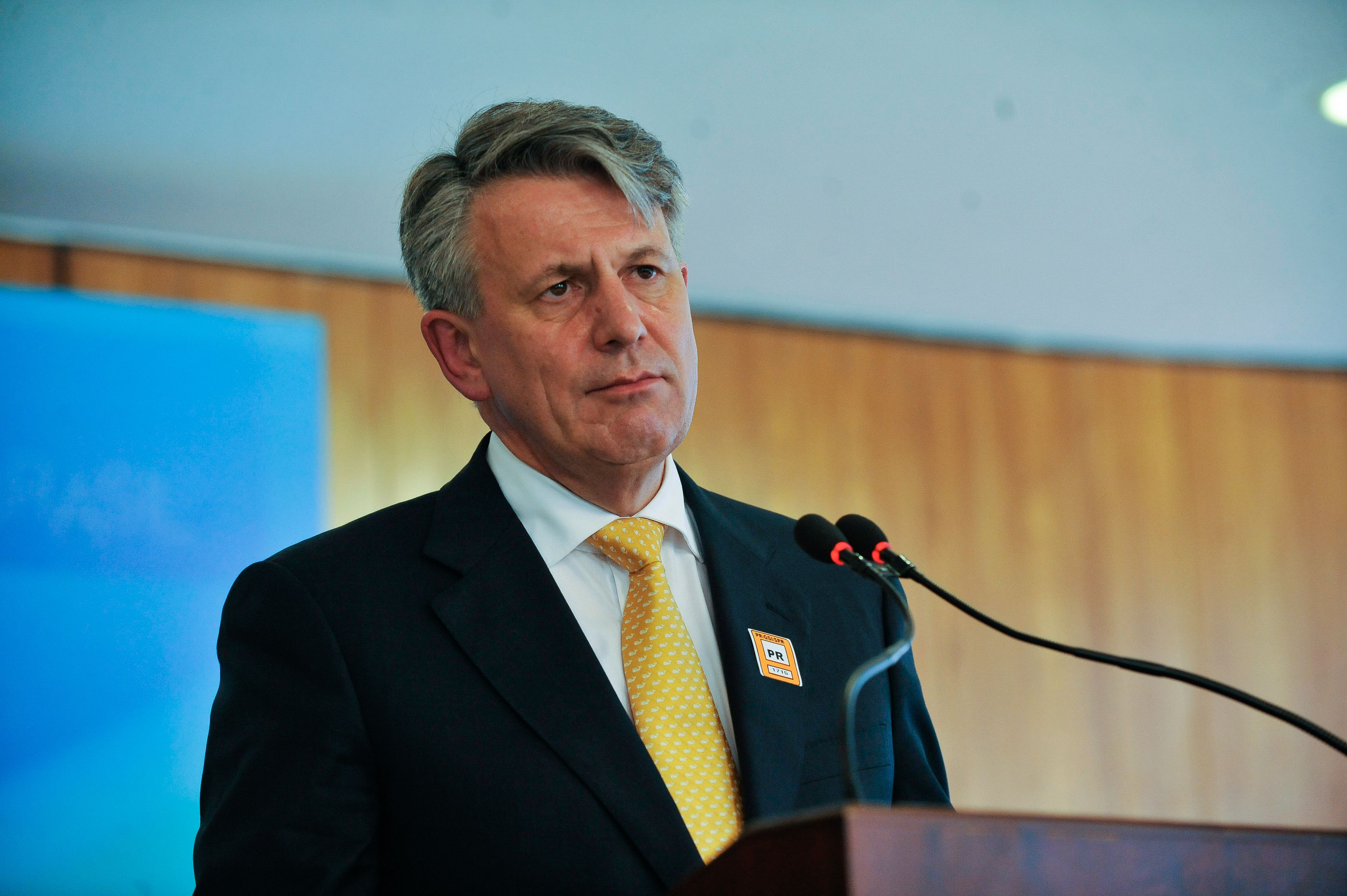 O presidente mundial da Shell, Ben van Beurden, fala com jornalistas após encontro com a presidenta Dilma Rousseff.